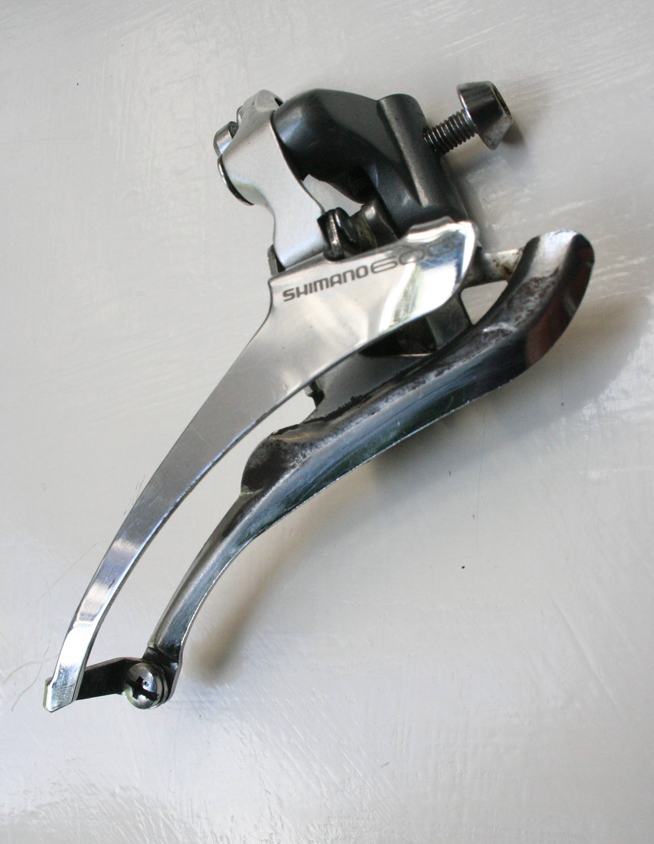 Rennrad Umwerfer (Shimano 600) zur Montage an Anlötsockel